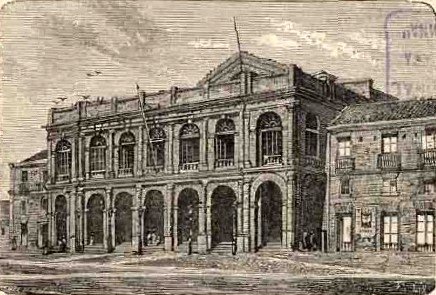 Santiago - Teatro Municipal (1872)